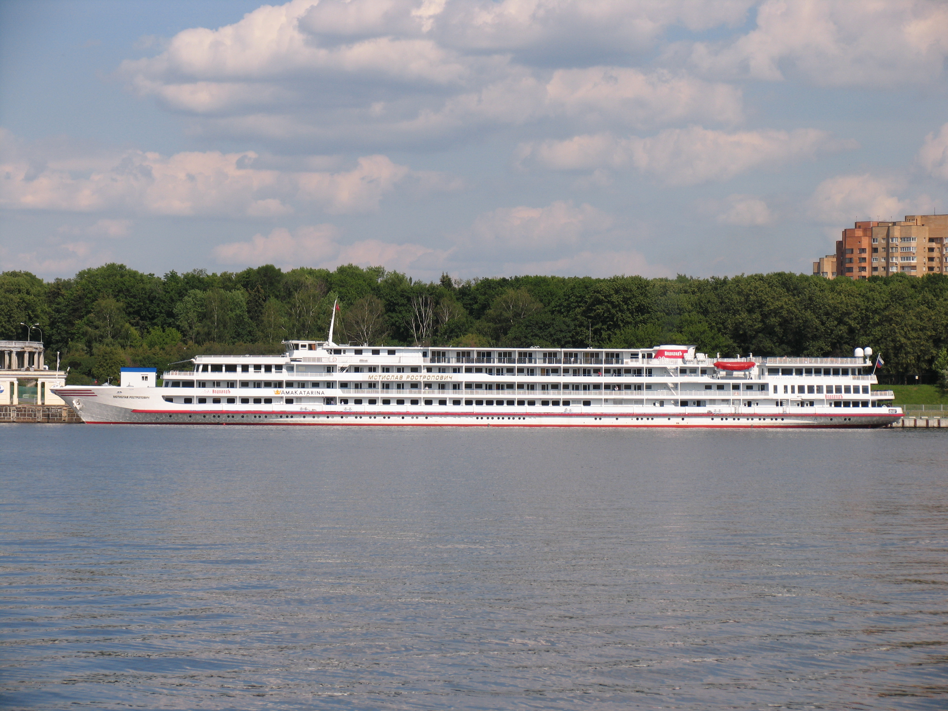 Речное круизное судно "Мстислав Ростропович" в Северном речном порту.